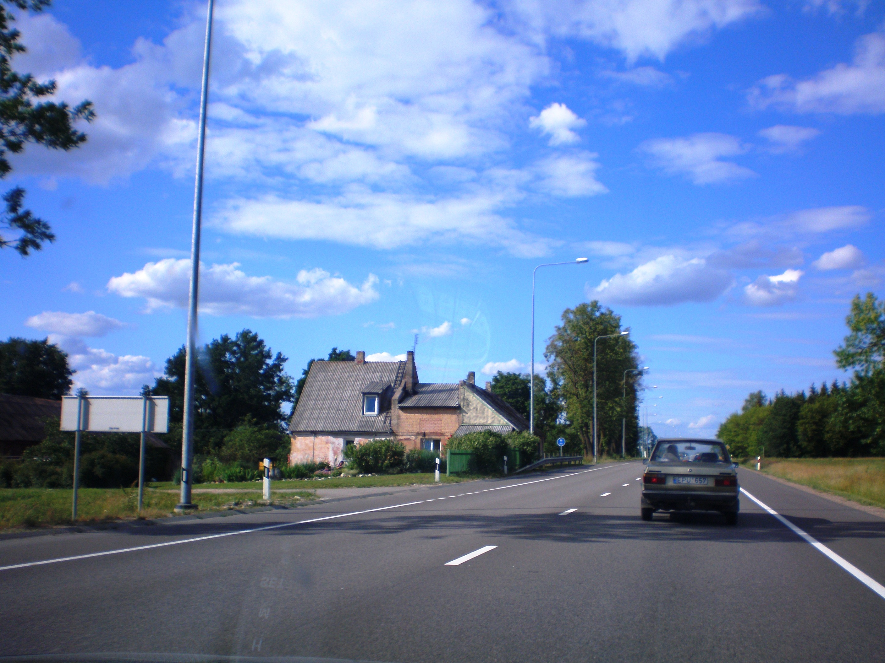 Talačkoniai, Pasvalio raj.